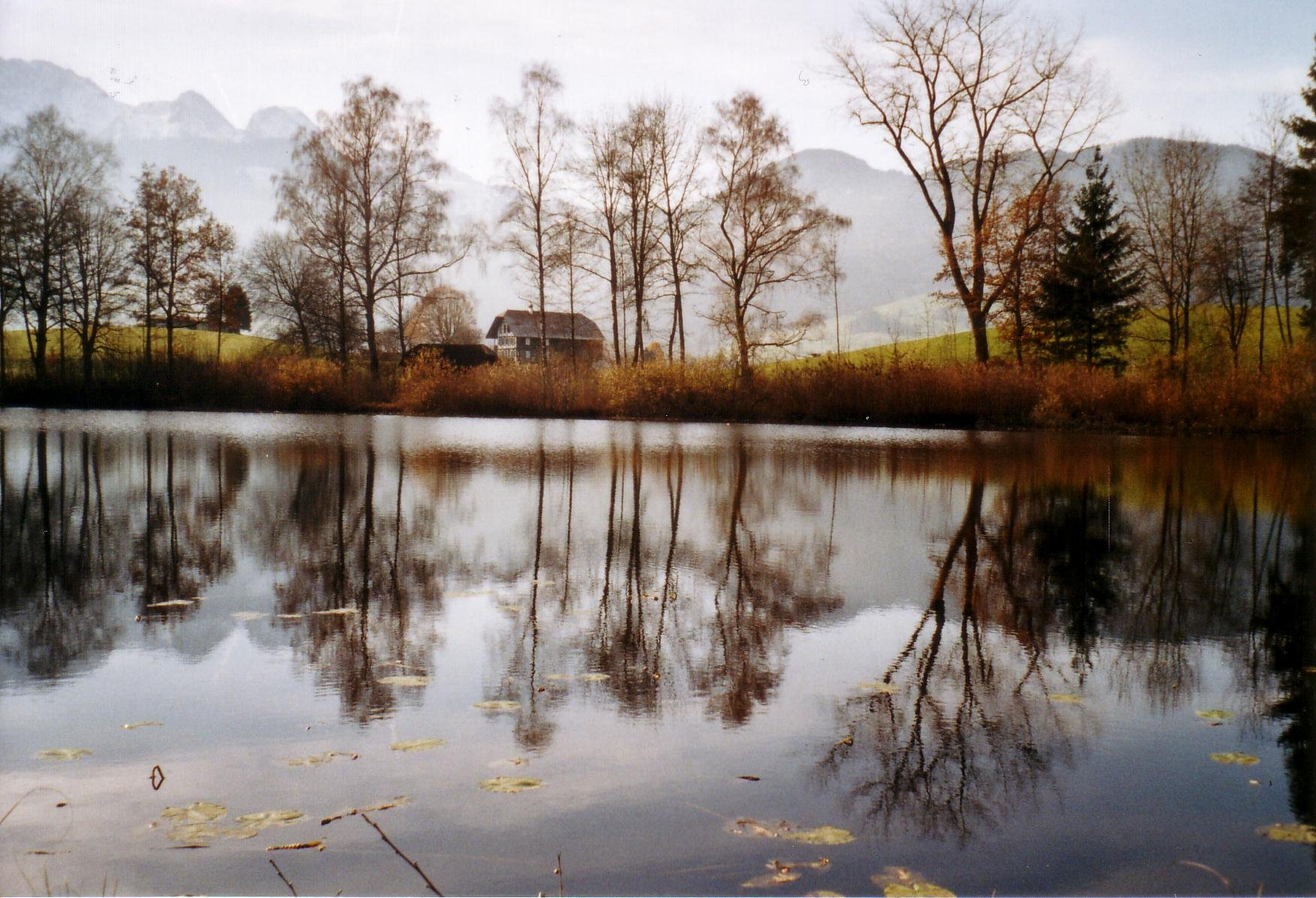 Geistsee im Gürbetal, Kanton Bern, Schweiz.